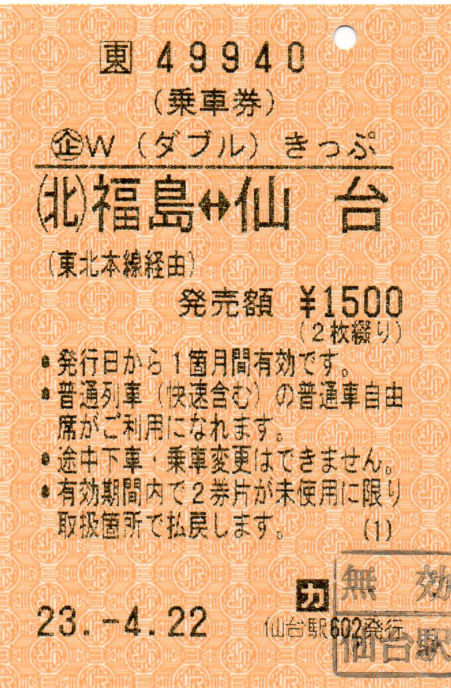 Wきっぷ福島～仙台（自動券売機での発行例） 2011年4月22日使用